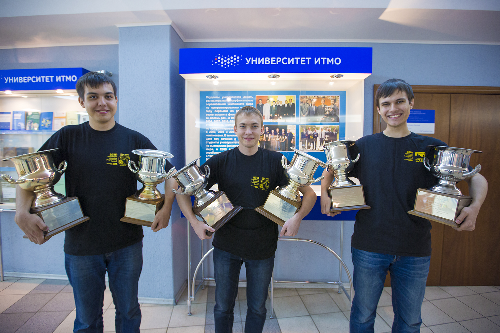 Команда Университета ИТМО, победители Чемпионата мира по программированию, 2015